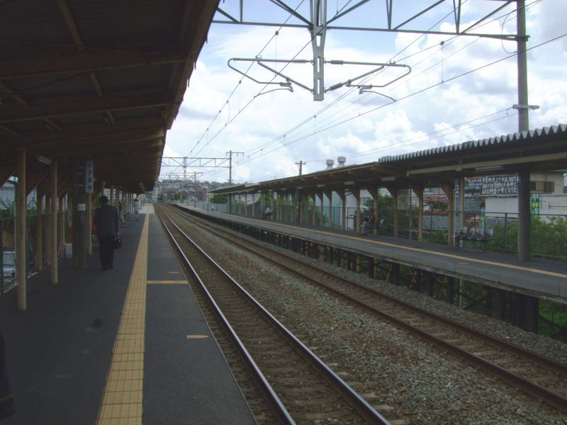 福岡県遠賀郡水巻町にあるJR鹿児島本線水巻駅 2008年8月13日 地図帳が撮影